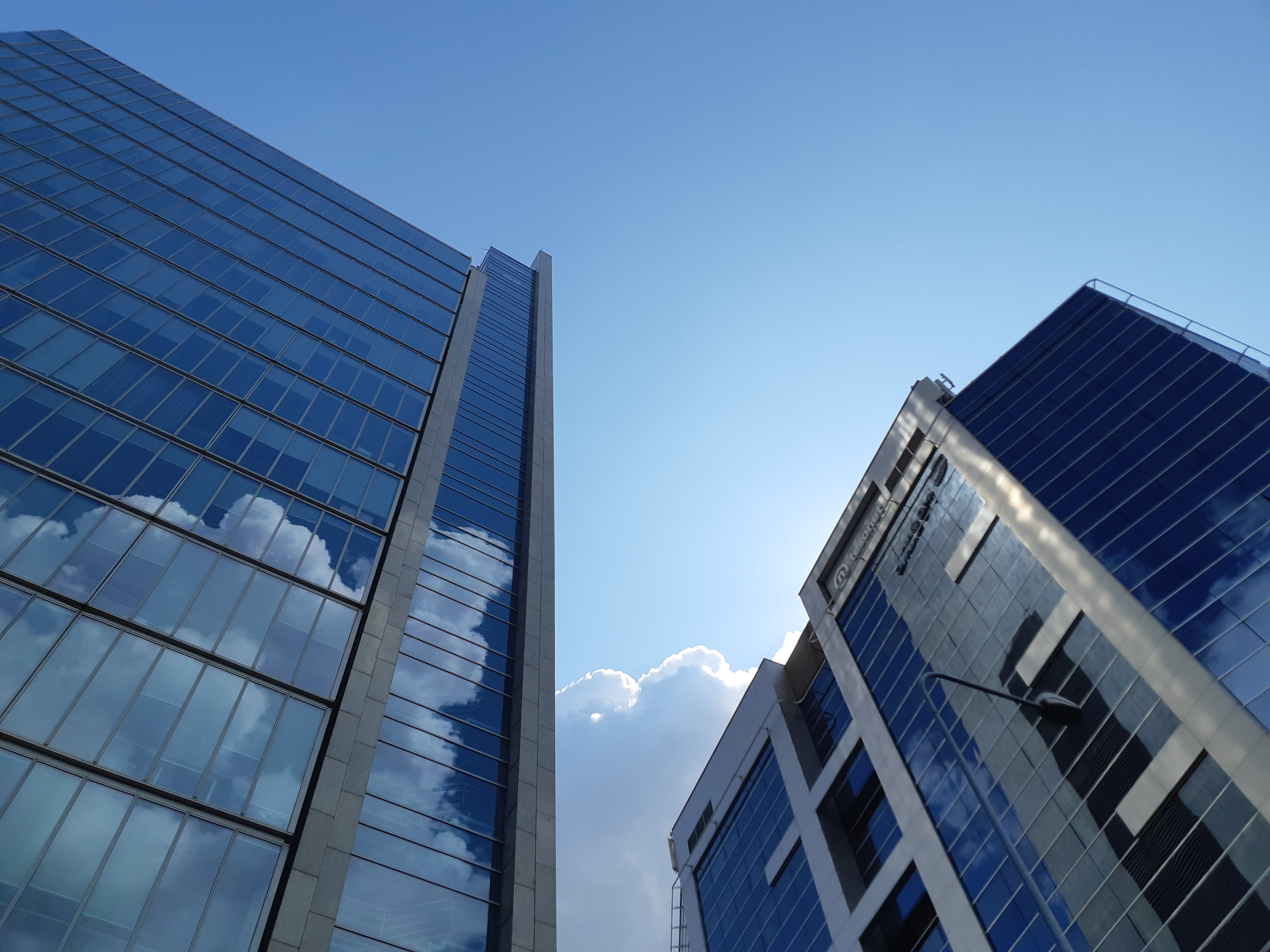 "Verslo trikampio", kuriame yra įsikūrusi UAB "G4S Lietuva" centrinė būstinė, dangoraižiai.